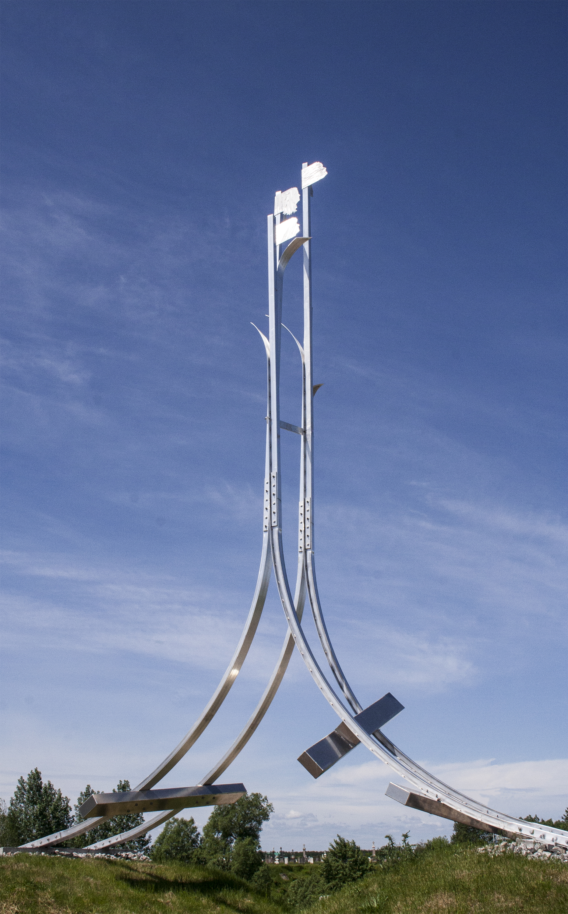 Il s'agit du Tacon-Site de la Fécondité réalisé par le duo d'artistes Interaction Qui (A. Laroche et J. Maltais) en 2010. Ce Tacon Site est réalisé dans le cadre du projet Événement-Ouananiche. Il porte le numéro 30 et appartient à la Municipalité de Hébertville-Station (Lac-Saint-Jean, Québec, Canada).